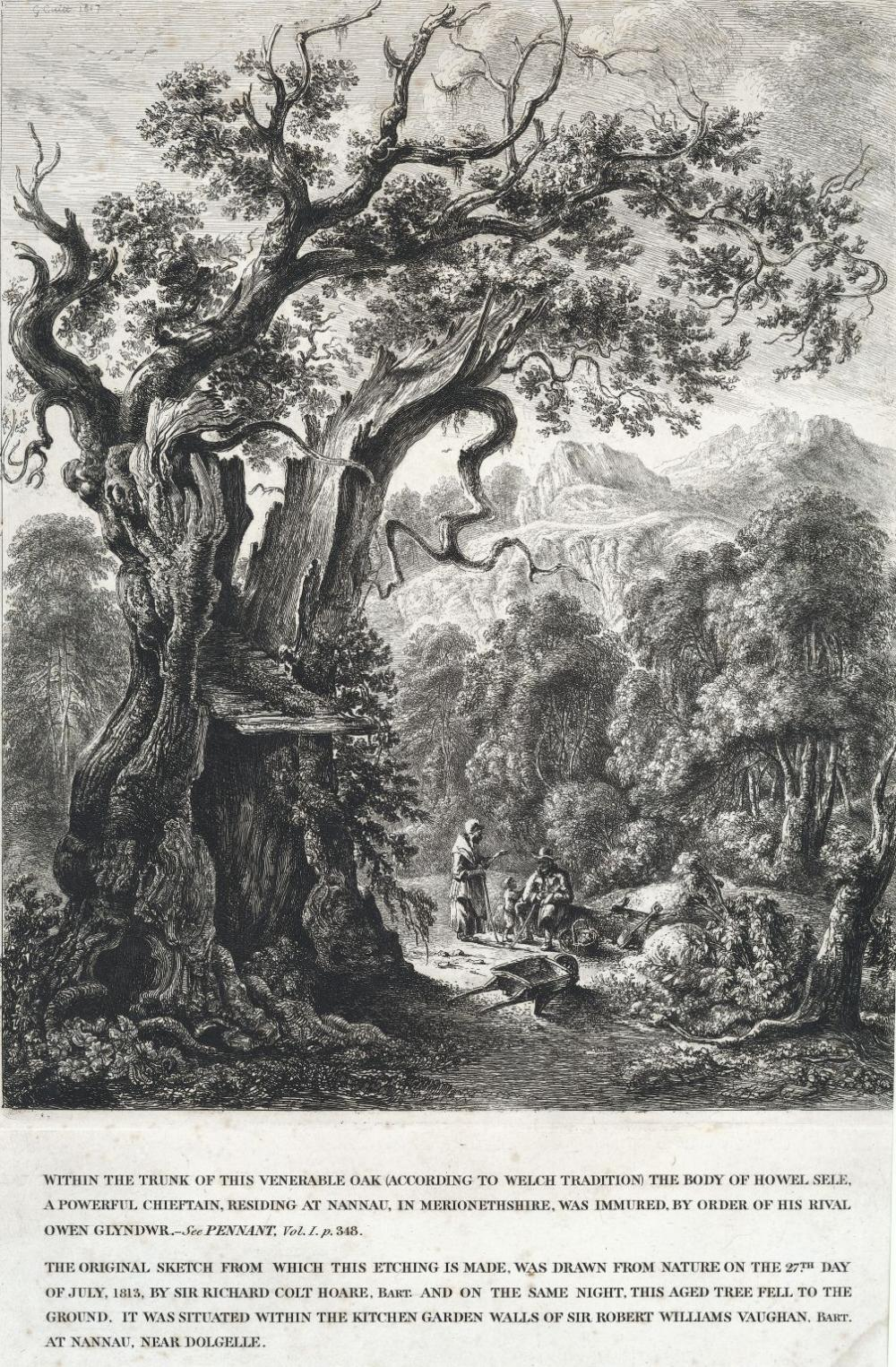 Ceubren Yr Ellyll